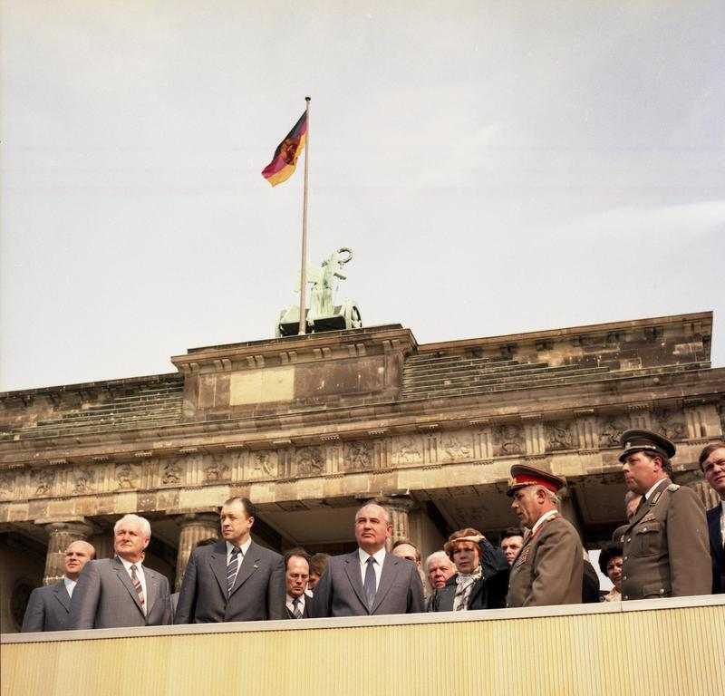 Berlin, Michail Gorbatschow an der Mauer ADN-ZB-Reiche- 16.4.86- Berlin: KPdSU-Delegationen Der Generalsekretär des ZK der KPdSU, Michail Gorbatschow, der die Delegation seiner Partei zum XI. Parteitag der SED leitet, besuchte die Staatsgrenze am Brandenburger Tor. L.: Günter Mittag, Mitglied des Politbüros und Sekretär des ZK der SED; 2.v.r.: Stadtkommandant Generalleutnant Karl-Heinz Drews. Abgebildete Personen: Mittag, Günter Dr.: Stellvertretender Staatsratsvorsitzender, Politbüro des ZK der SED, FDGB, DDR (PND 11897629X) Drews, Karl-Heinz: Generalleutnant der Grenztruppen, Stadtkommandant Berlin, DDR Gorbatschow, Michail: Präsident, Vorsitzender des Obersten Sowjets, Friedensnobelpreisträger, Sowjetunion